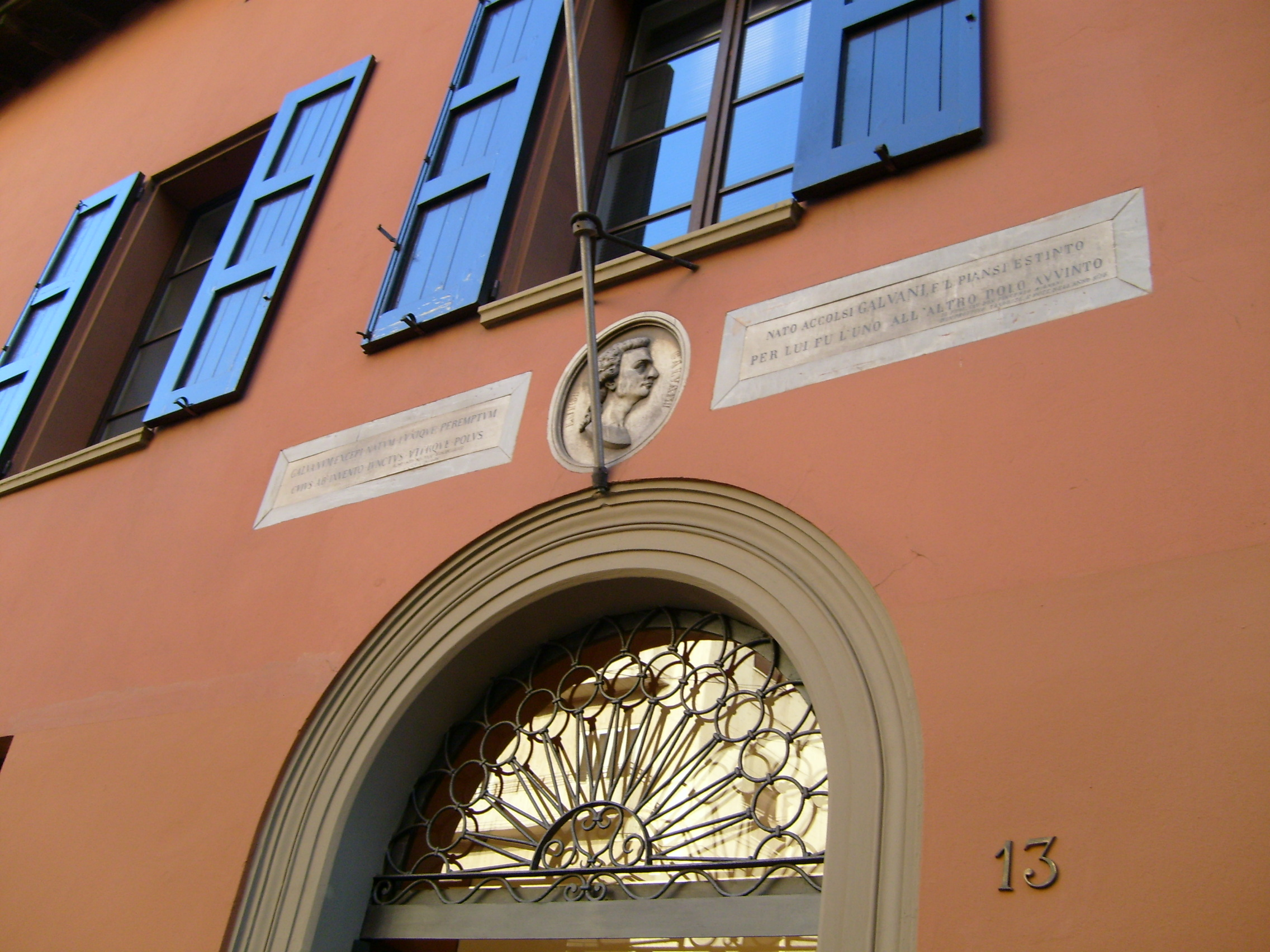 Luigi Galvani’s home, via Marconi 13, Bologna, Italy